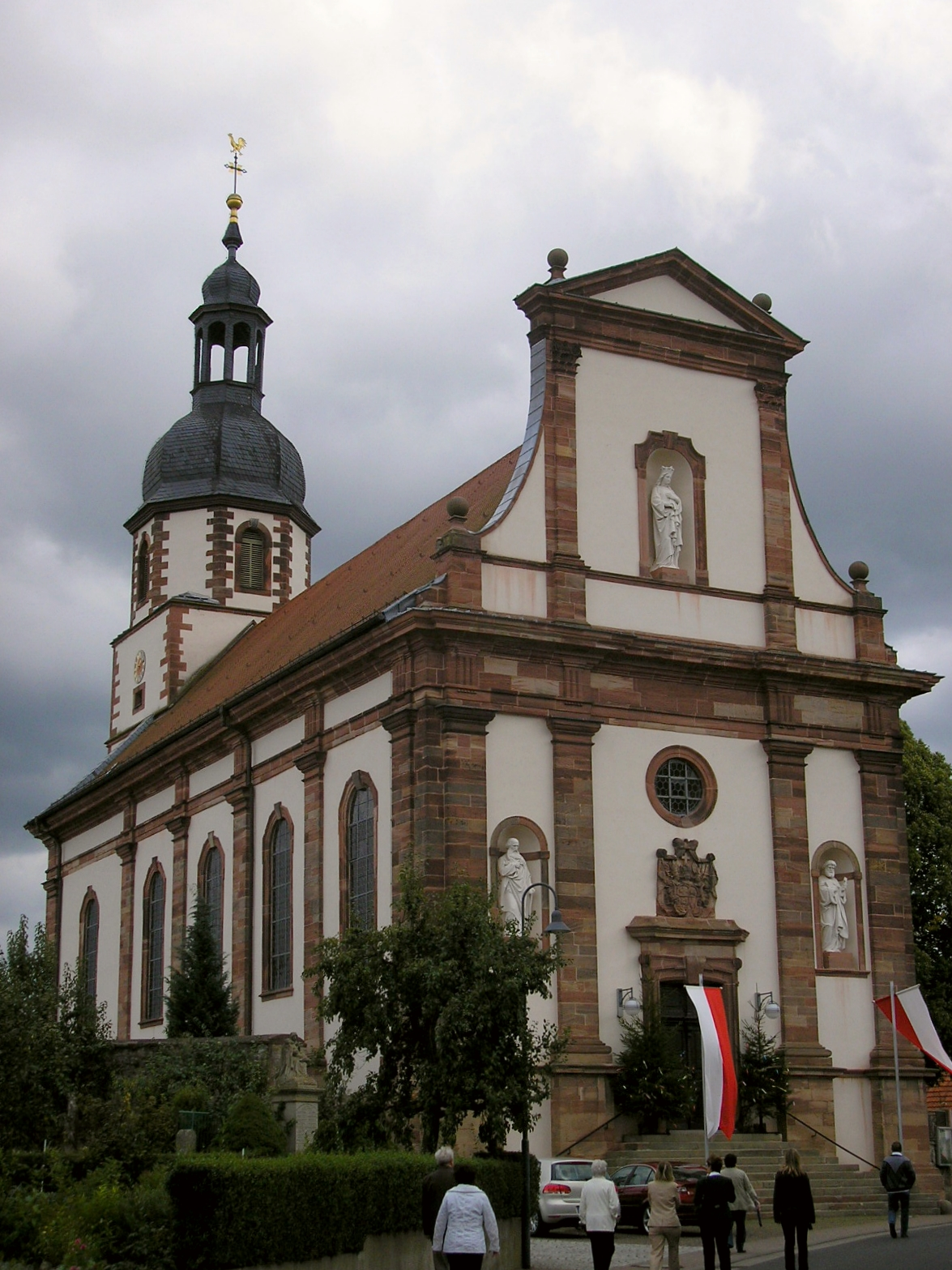 Die Dorfkirche von Schleid (Thüringen).